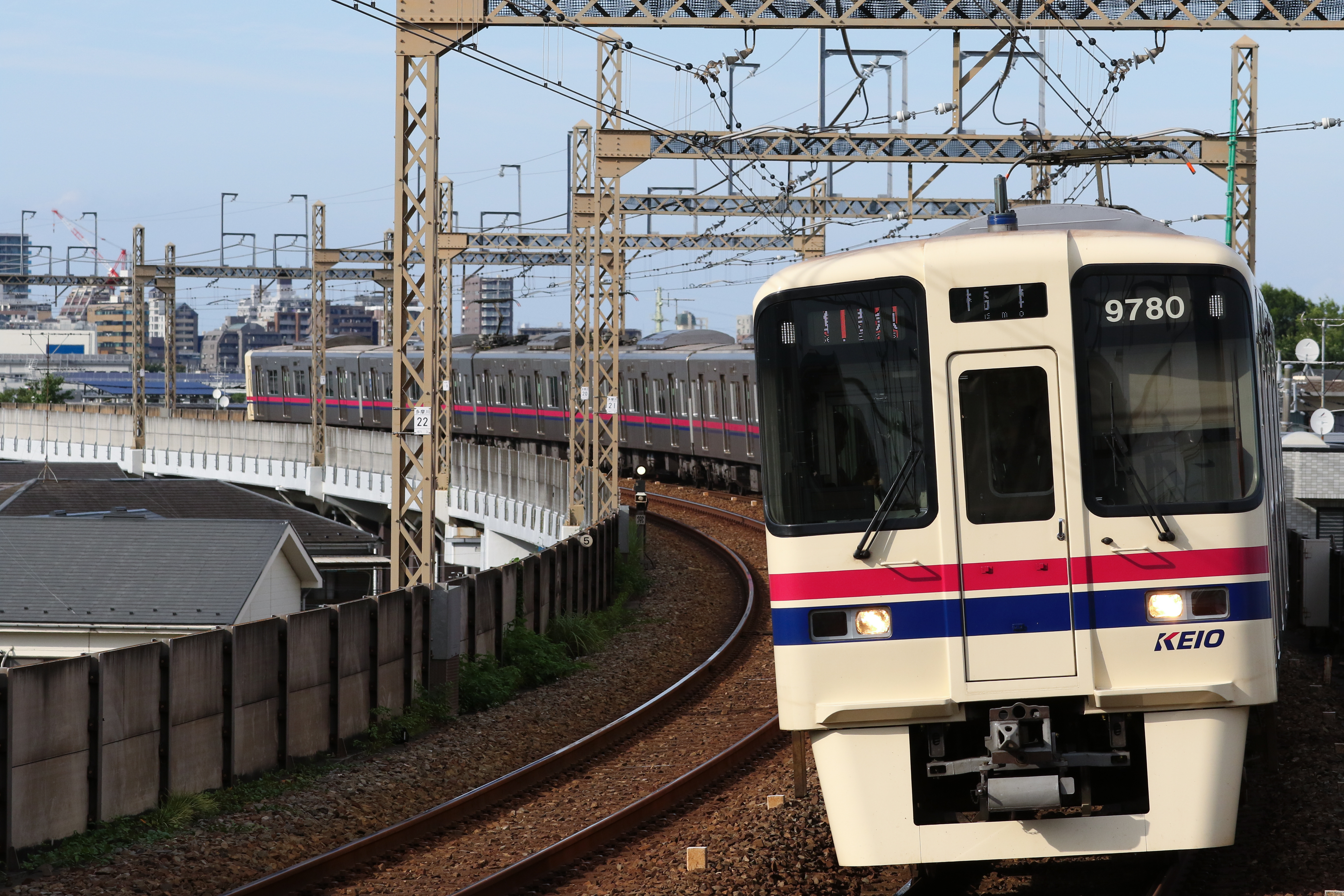 京王 #9000系 最終増備車。ロゴの位置が違う。